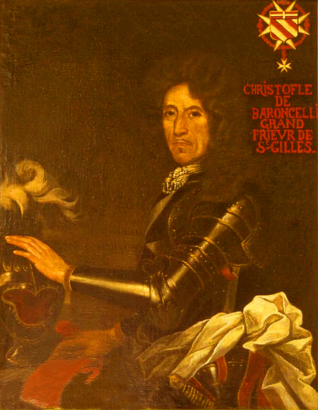 Christophe de Baroncelli-Javon, grand prieur de Saint-Gilles de 1699 à 1714